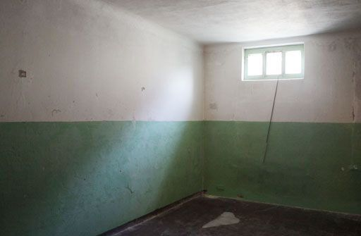 Gefängniszelle in der Gedenk- und Begegnungsstätte Ehemaliges KGB-Gefängnis, Leistikowstraße Potsdam